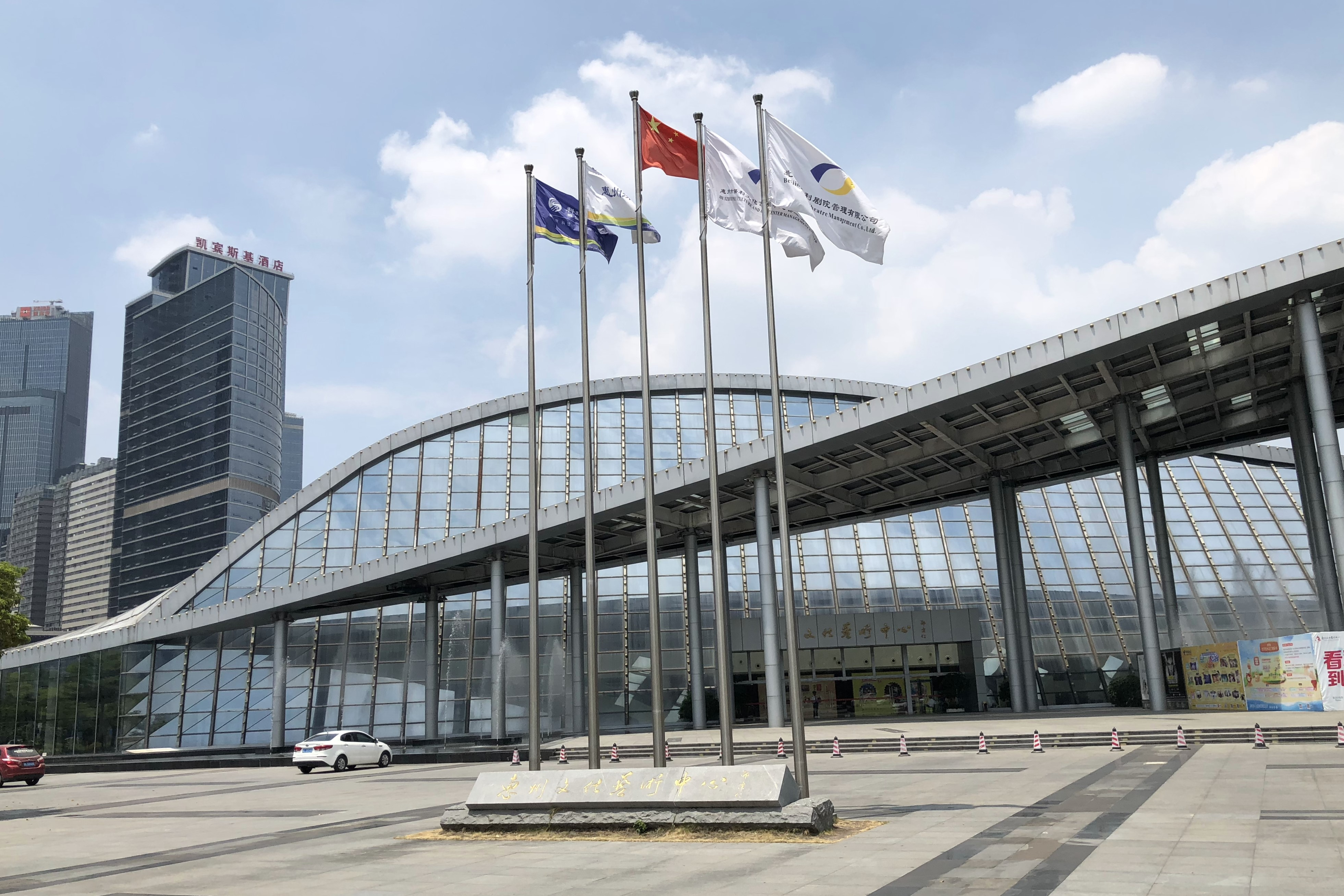 中文（中国大陆）: 惠州文化艺术中心